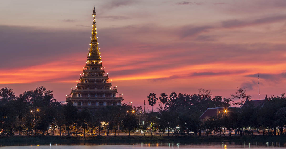 พระธาตุ 9 ชั้น ริมบึงแก่นนคร